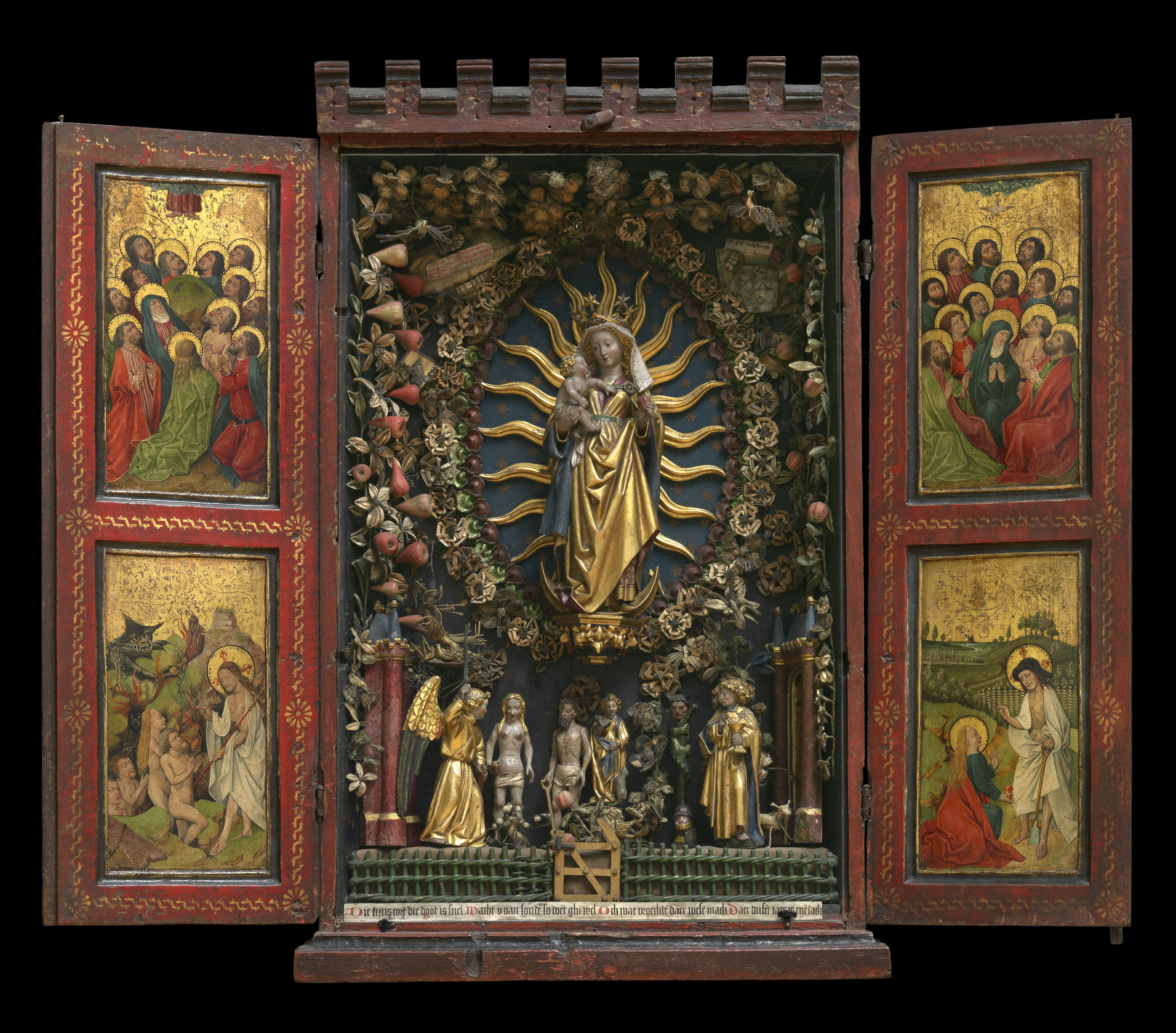 beeldhouwwerk ( Anonieme Meester, Brabants, 16de eeuw, koninklijk museum voor schone kunsten antwerpen